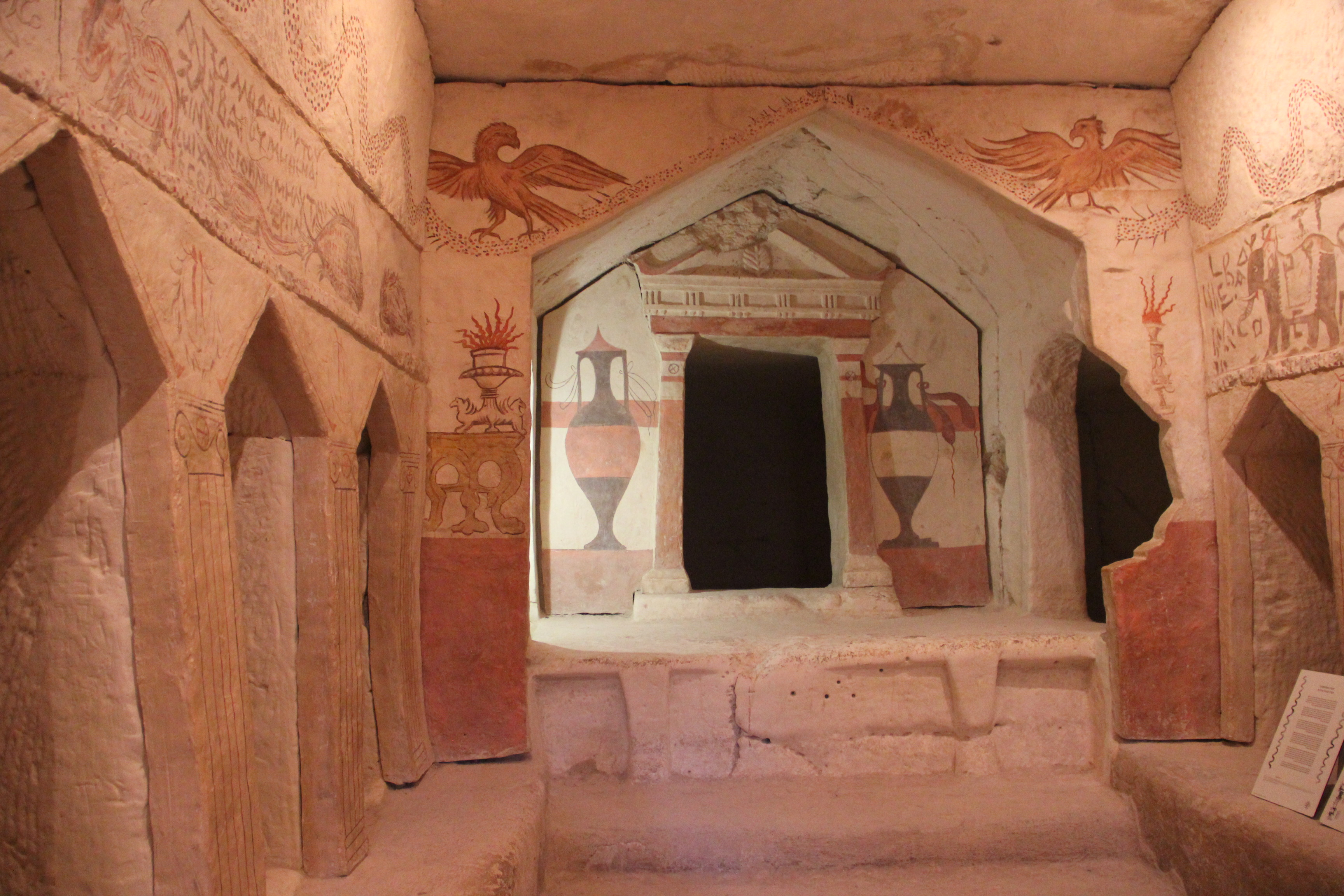 Caves at Beit Govrin